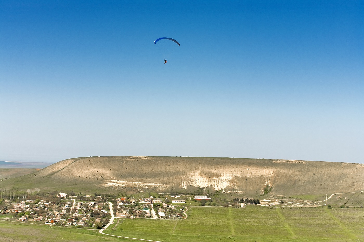 «Воздухоплавний комплекс „Узун-Сирт, гора Клементьева“» с. Первомайське (Кіровський р-н), с. Насипне, с. Коктебель (м. Феодосія).